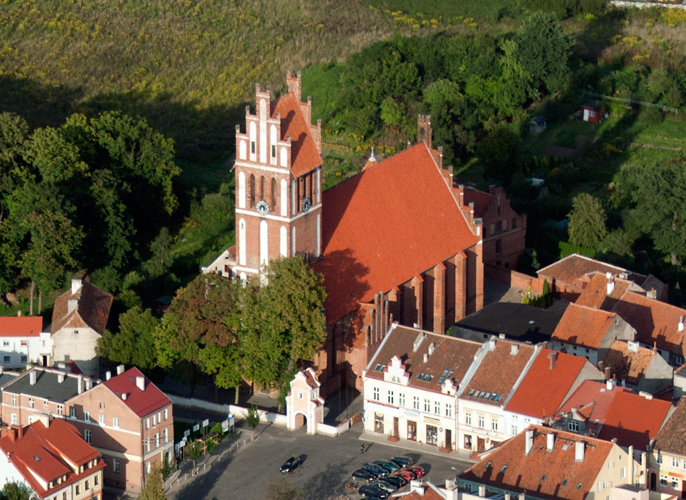 kościół farny pw. św. Bartłomieja wraz z wyposażeniem wnętrza Jeziorany, Jeziorany (miasto)